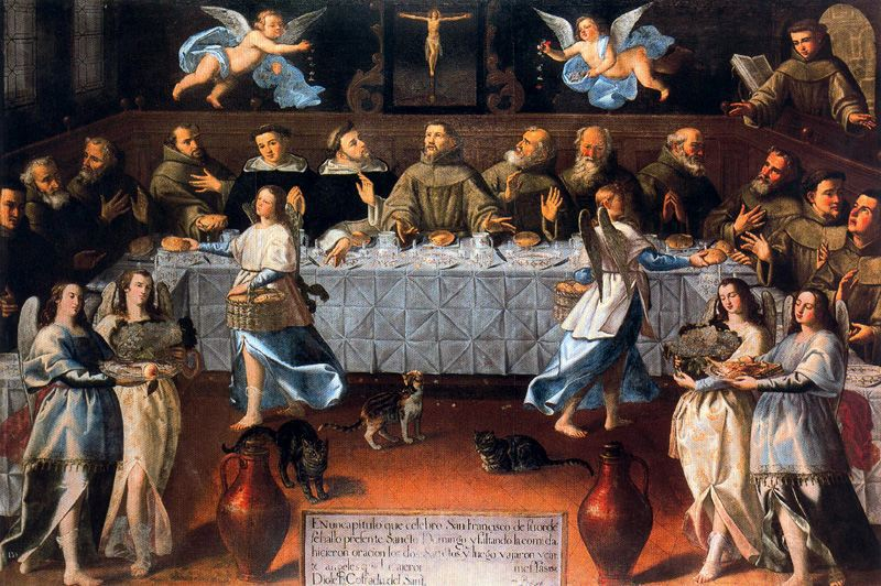 La obra representa el encuentro de San Francisco de Asís con Santo Domingo de Guzmán y el milagro que ocurrió en dicho encuentro.